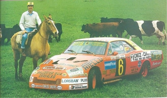 Oscar Castellano junto a su Dodge en 1983.